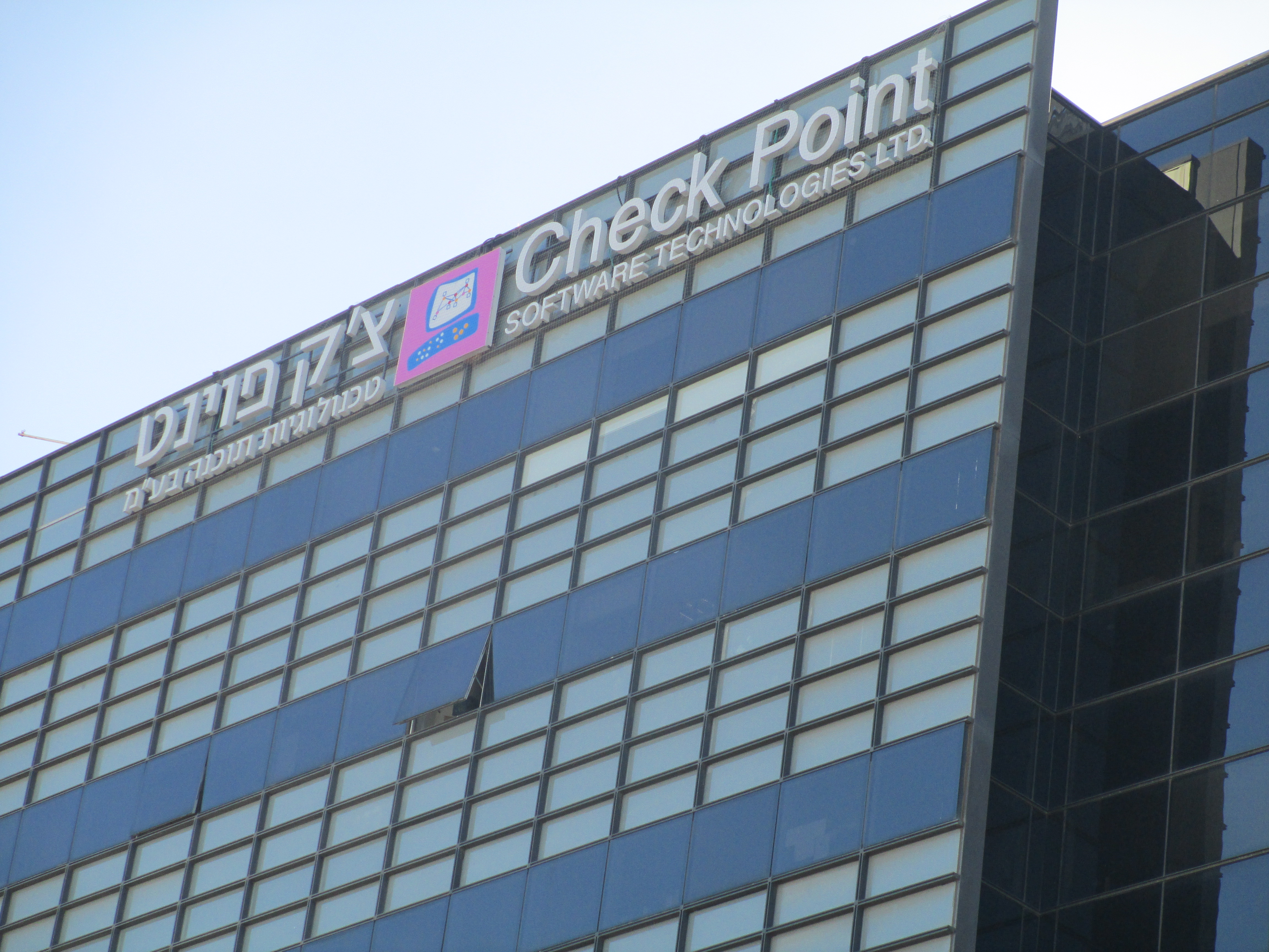 בניין צ'ק פוסט בתל אביב